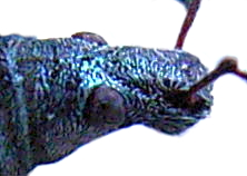 Fühlergrube Phyllobius spec.